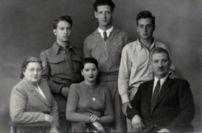 משמאל יושבים האם מרים האחות עדינה האב יהושוע, עומדים משמאל האח זאב, אברהם כספין, האח ישראל